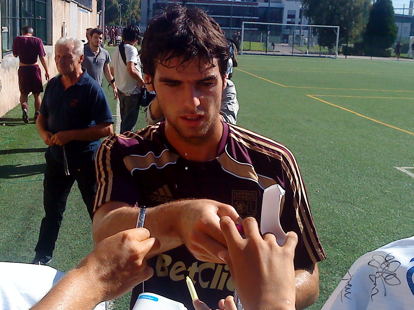 Yoann Gourcuff à la fin de son premier entrainement avec l'Olympique lyonnais